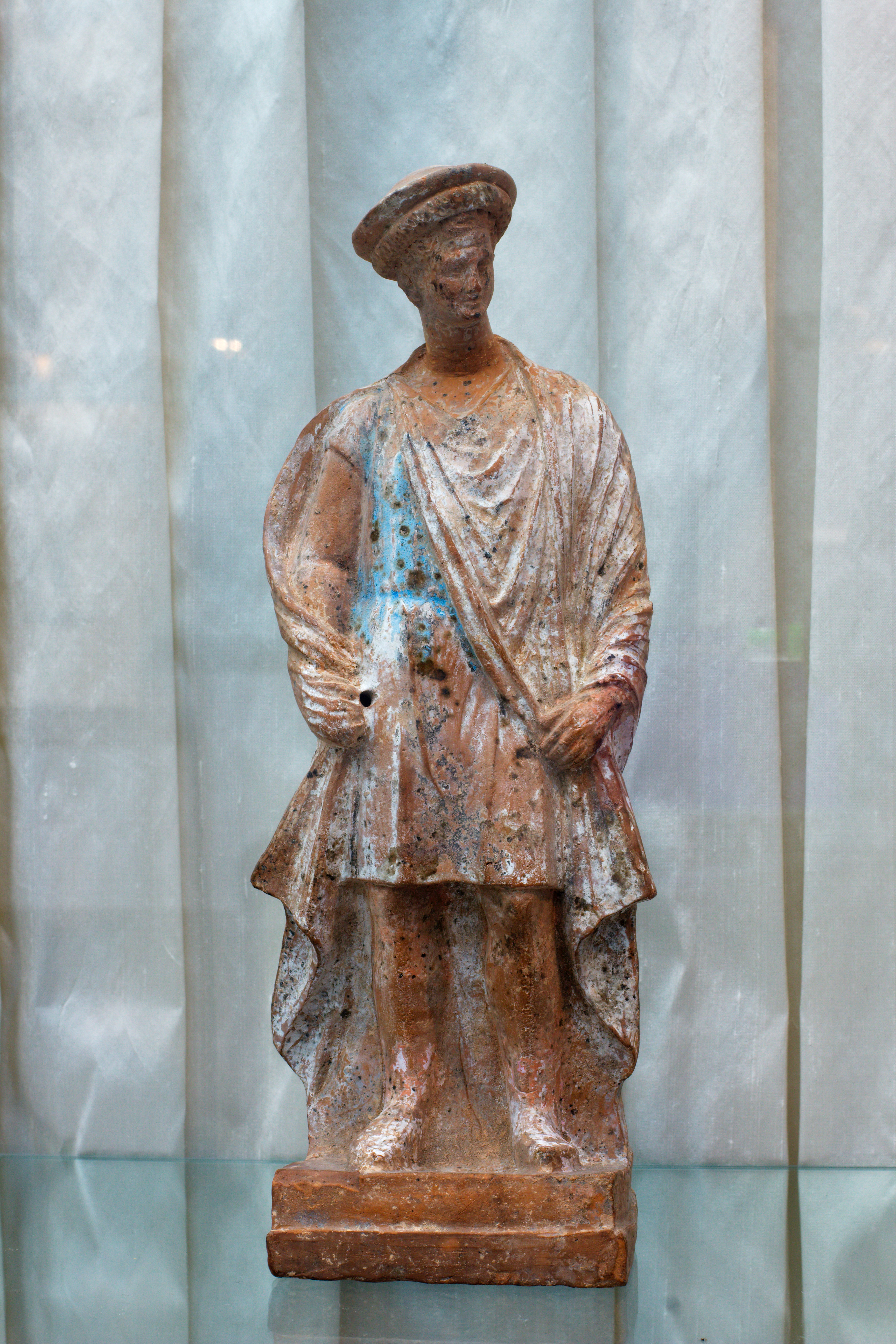 Griechische Terrakotta eines jugendlichen Reisenden. (Böotien) .